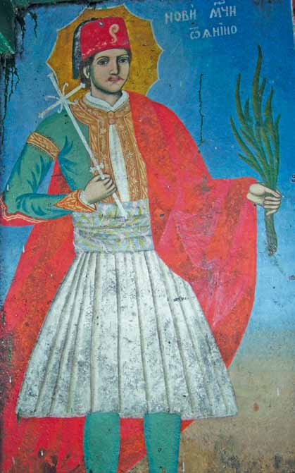 Свети Георги Нови Янински, стенопис от „Архангел Михаил” в Копиловци, 1876